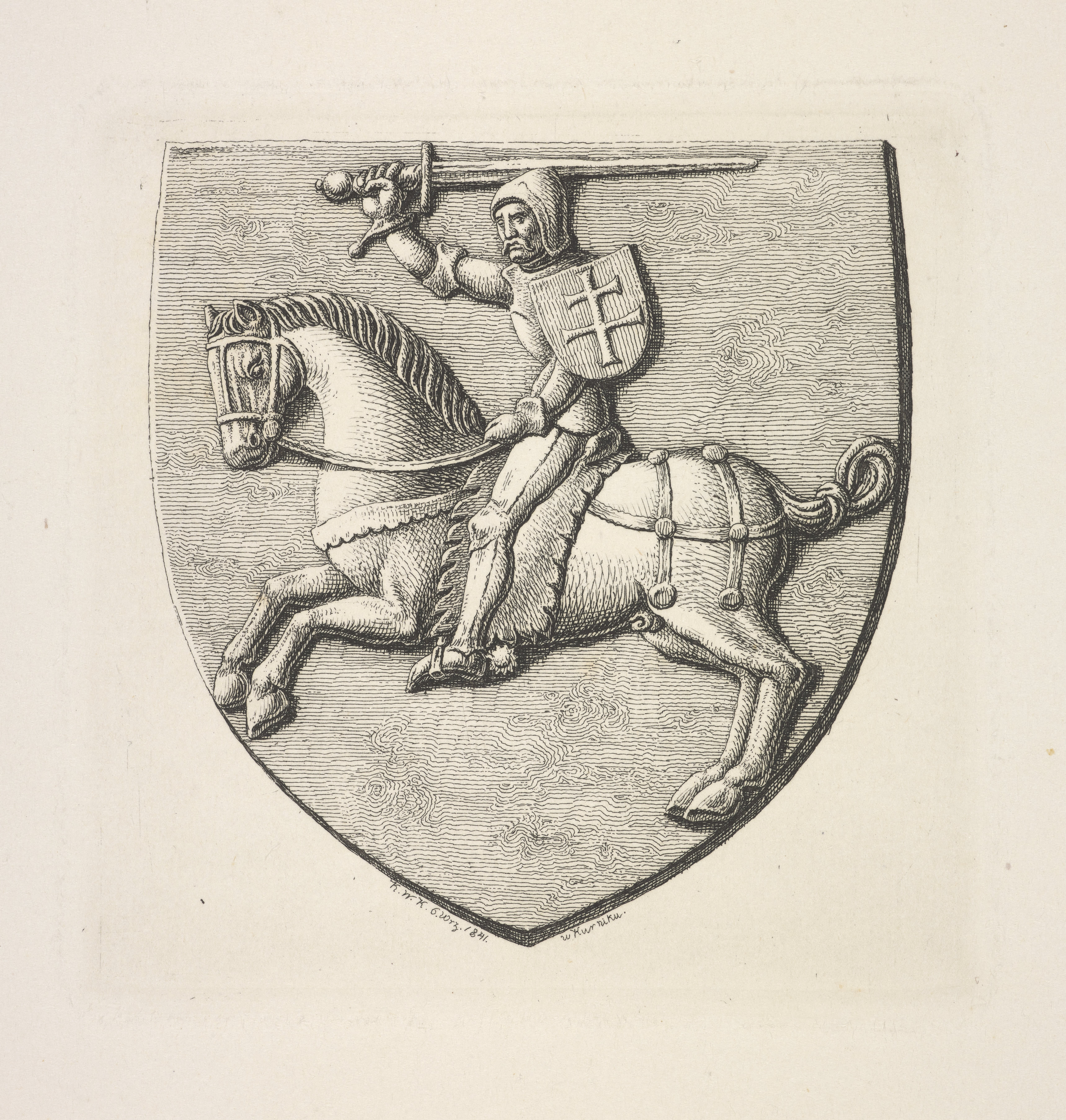 Беларуская (тарашкевіца): Герб Вялікага Княства Літоўскага «Пагоня» («Pahonia») з надмагільля Ягайлы (Jagajła)